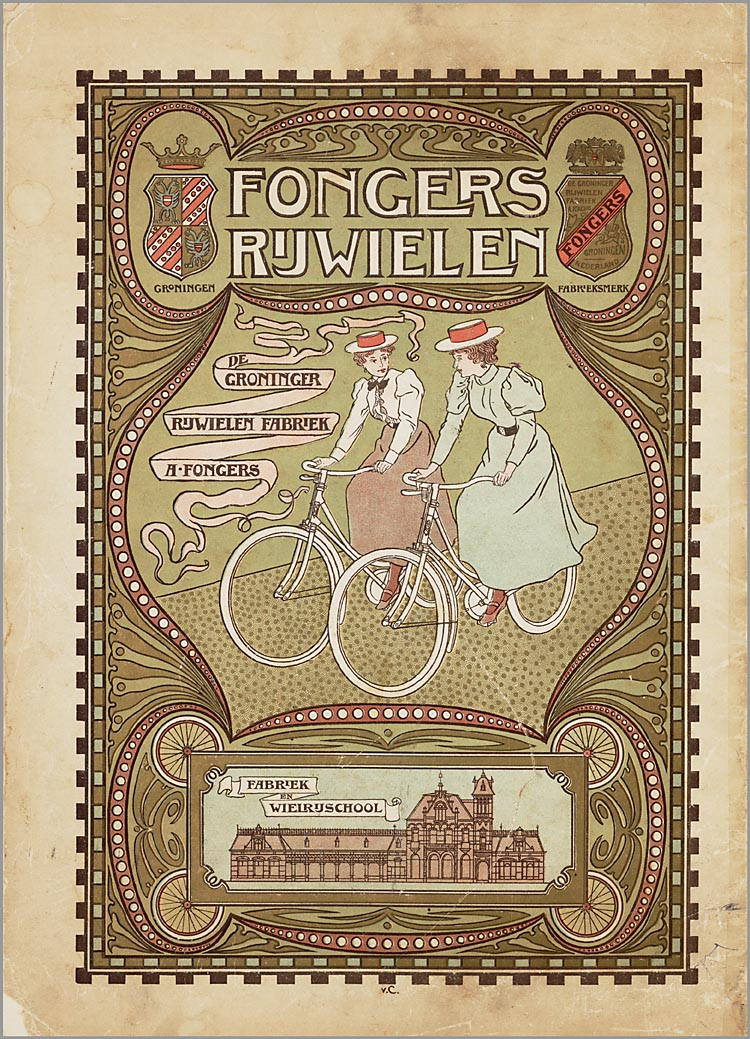 Affiche "De Groninger rijwielenfabriek A. Fongers".